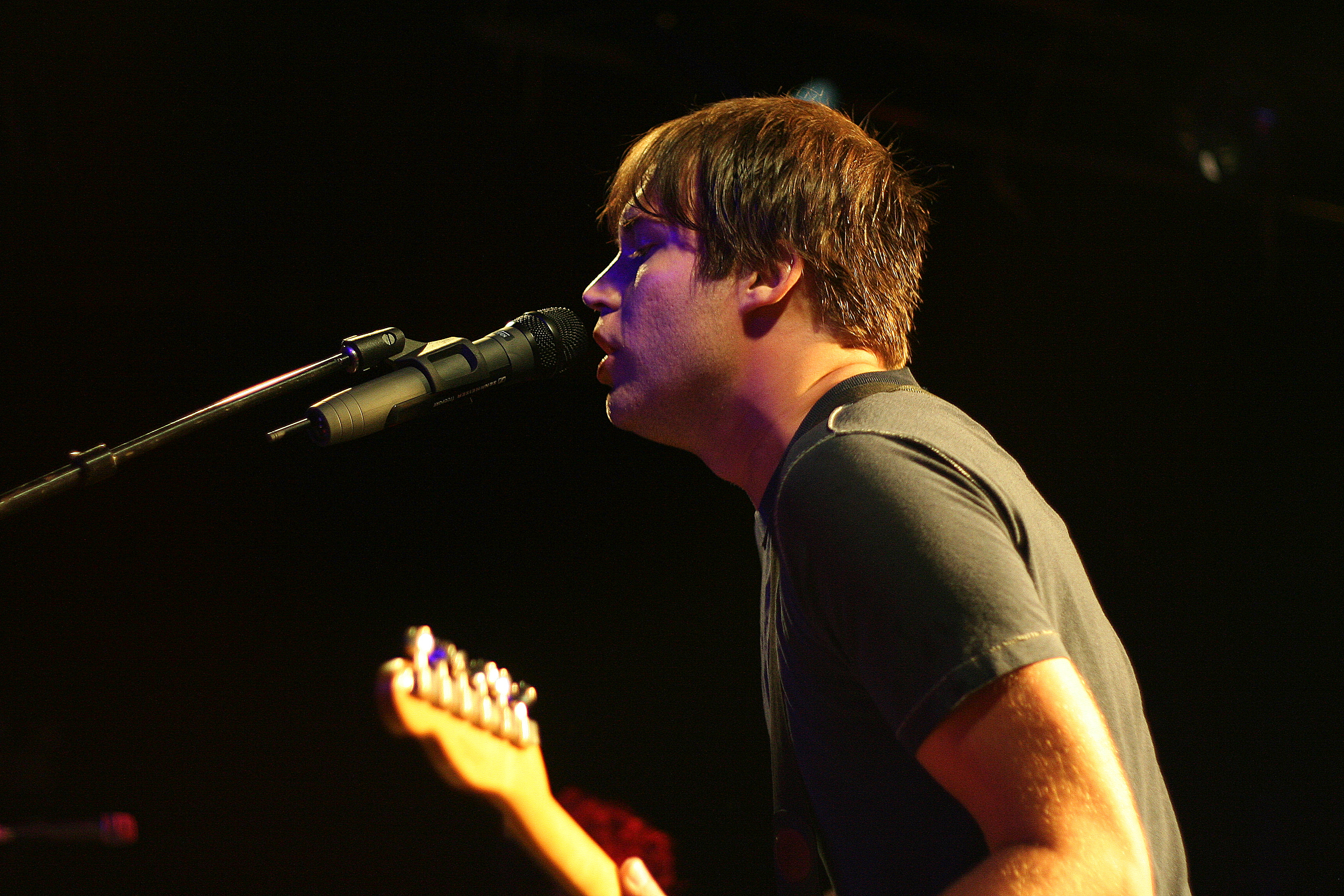 20090723_stellastarr 085